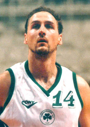 Dino Rdja